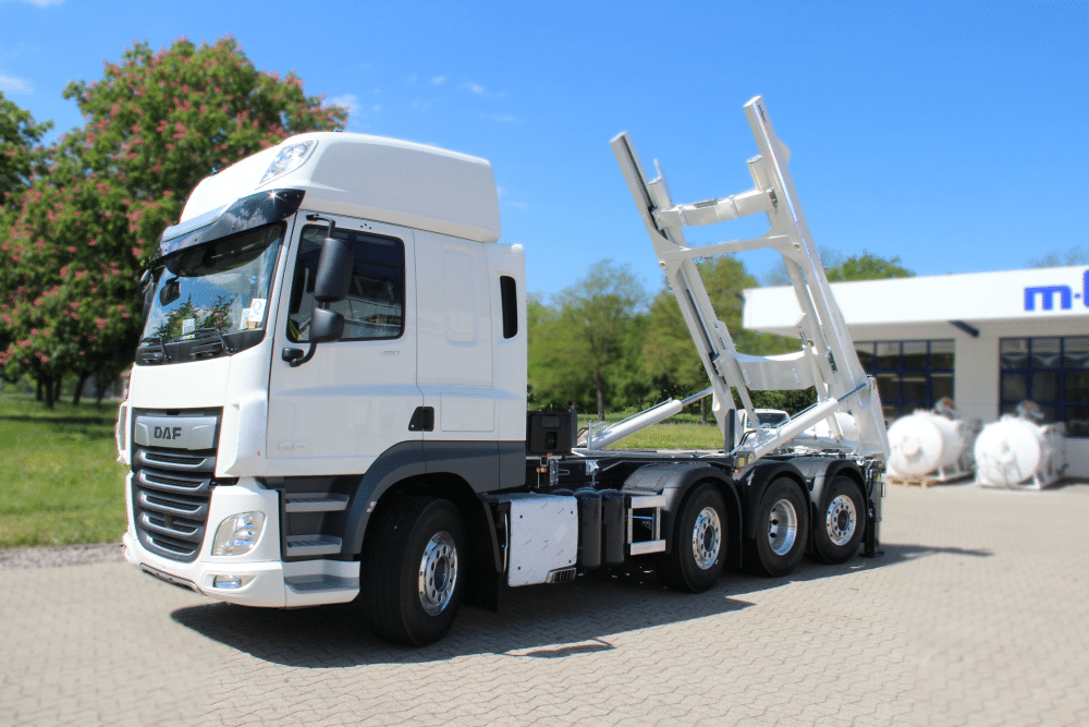 m-tec Taschensilosteller